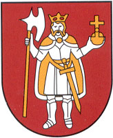 Čachtice - erb